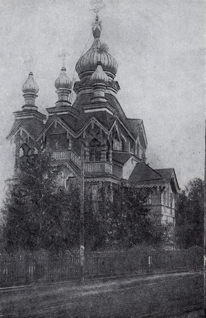 Православный храм в Райвола (Рощино)